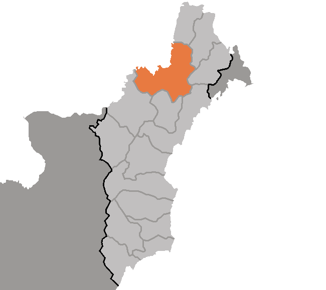 Map of Hoiryong, Hamgyong-pukto, DPRK, 2006